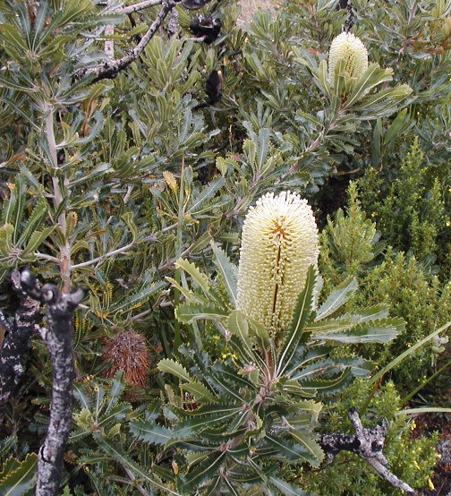 Banksia aemula, Wybung Head - Lake Munmorah Photo - Cas Liber